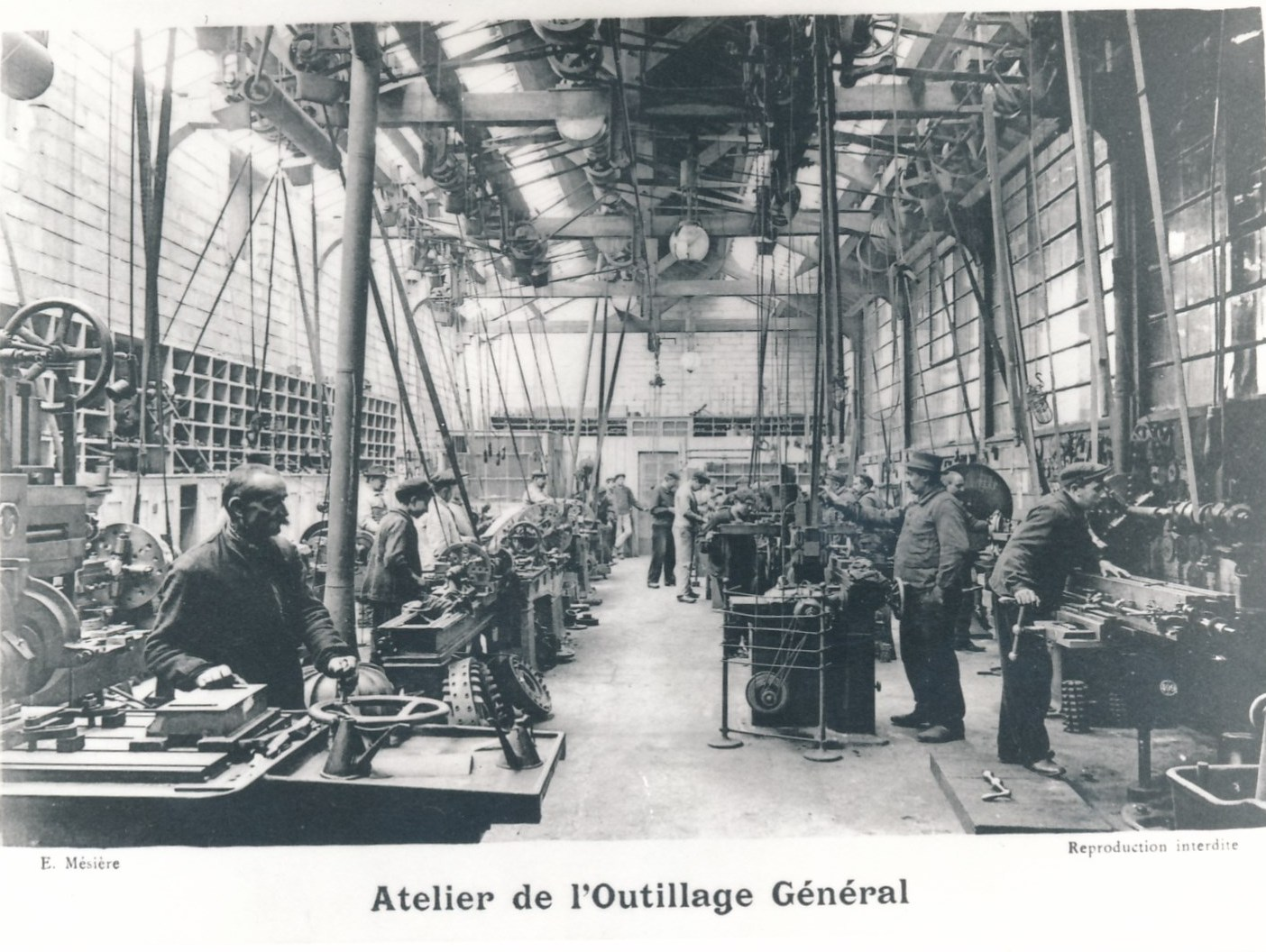 Ateliers Fives-Lille de Givors, outillage général, env.1910. Archives municipales de Givors, cote 5Fi 1922